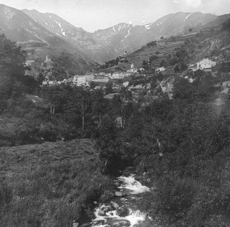 Vista general de Vallmanya amb muntanyes al fons. Frederic Bordas i Altarriba (ca. 1890)